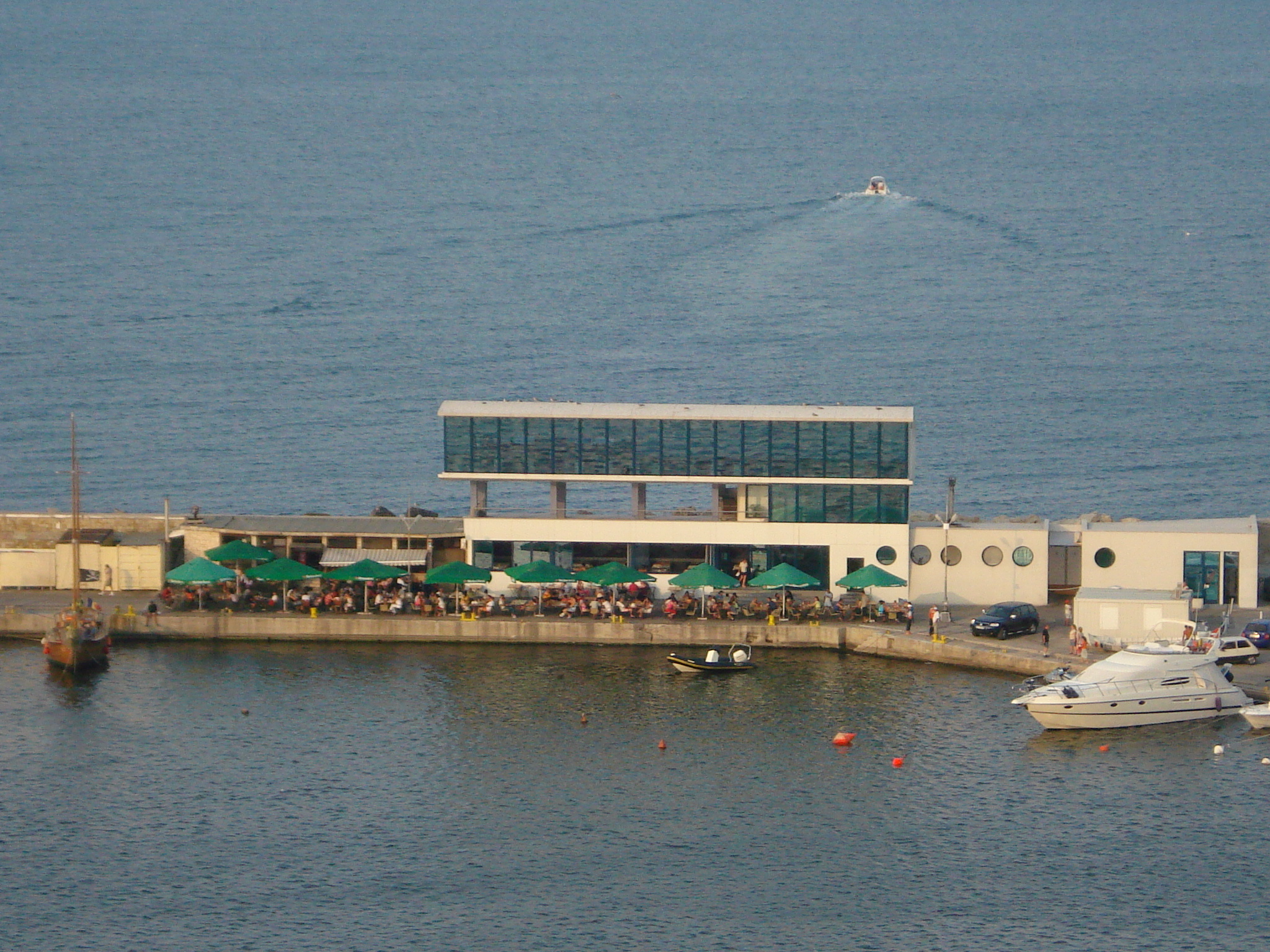 Portul Tomis Constanta, Romania